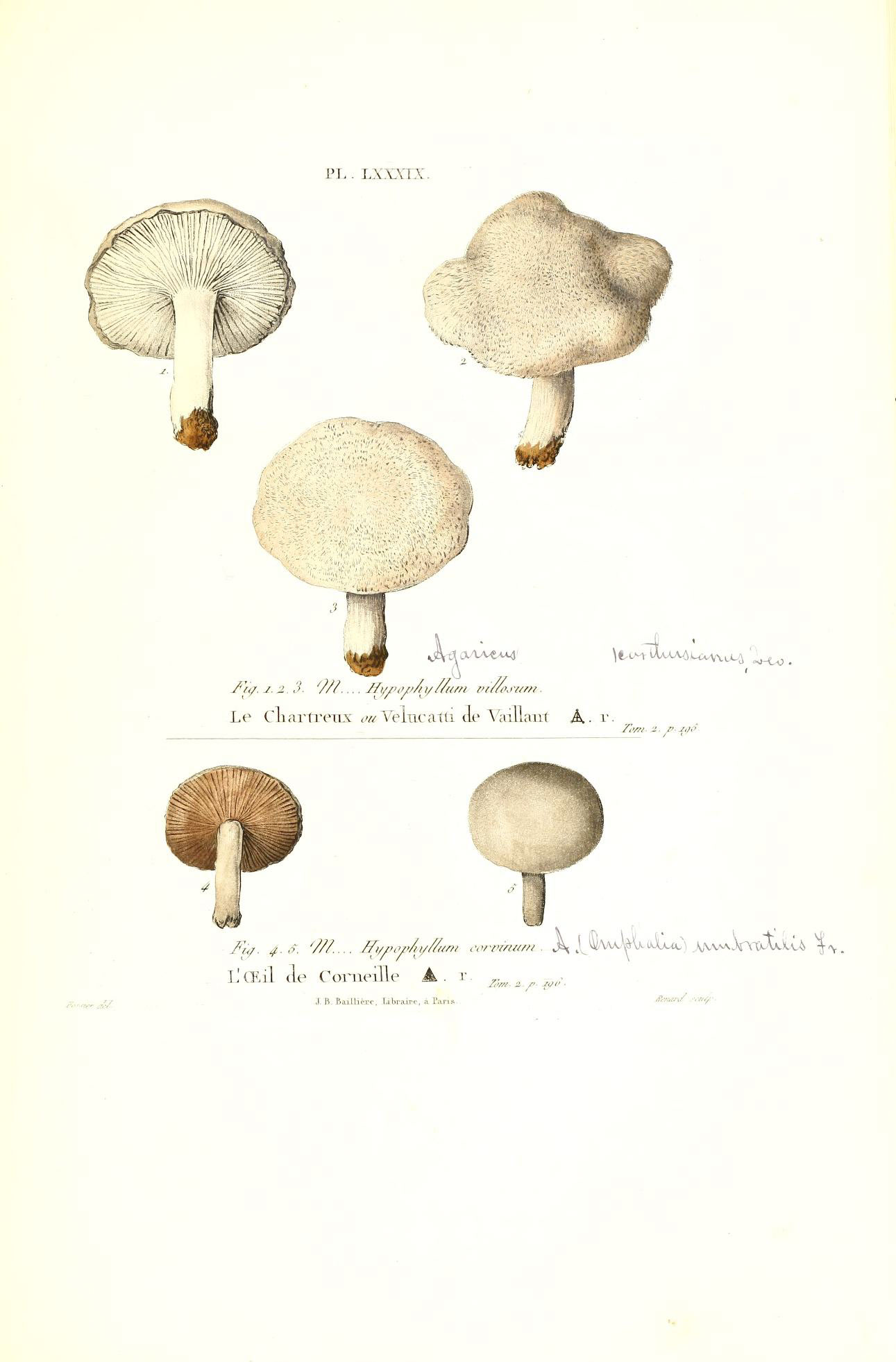 PL. LXXXIX 1.🍄 2🍄 3🍄 Agaricus 〓anthusianus, Leo. Fig.1.2.3. M.... Hypophyllum villosum Le Chartreux ou Velucatti de Vaillant ⨹. r. Tom. 2. p. 196 4🍄 5🍄 Fig. 4.5. M.... Hypophyllum corvinum A.(Omphalia) umbratilis Fr. L’Œil de Corneille ▲. r. Tom. 2. p. 196 〓〓〓 〓〓〓 J. B. Bailliére, Libraire, á Paris